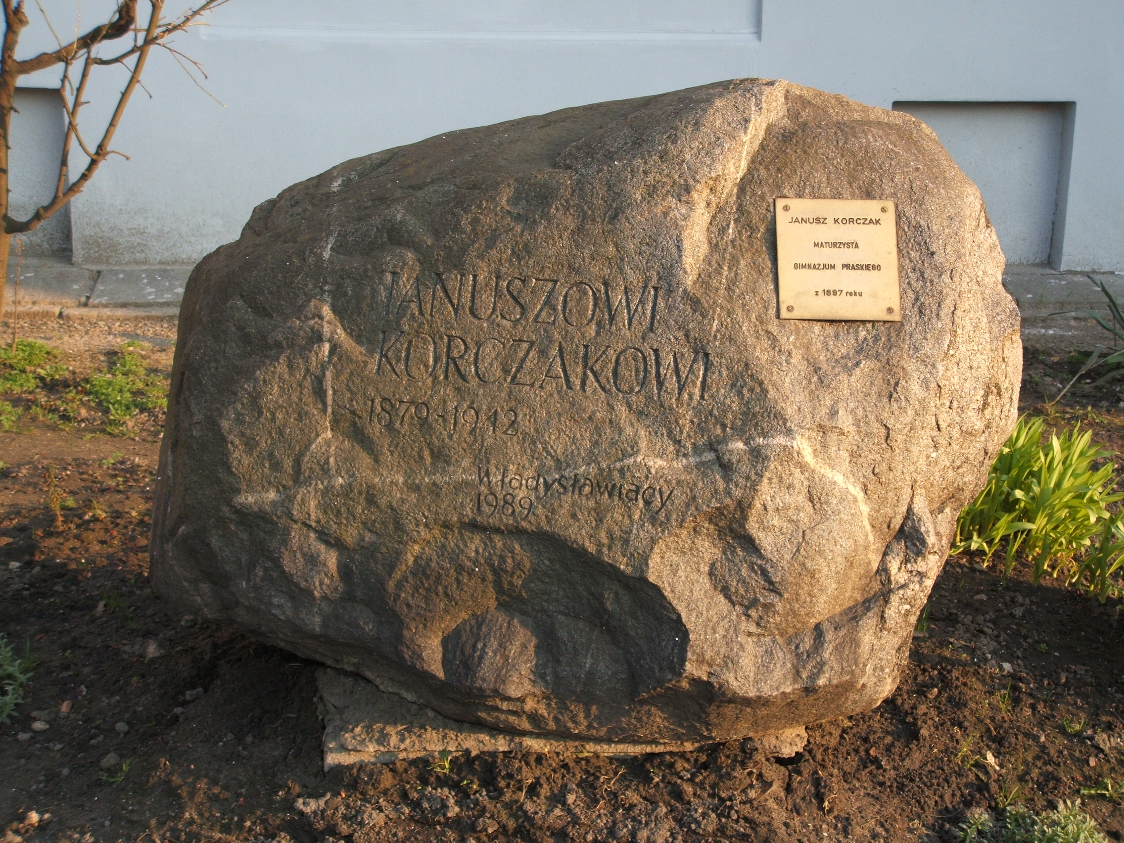 Głaz od strony al. "Solidarności" upamiętniający Janusza Korczaka